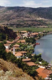 Село Лин на брега на Охридското езеро, Окръг Поградец, Албания.